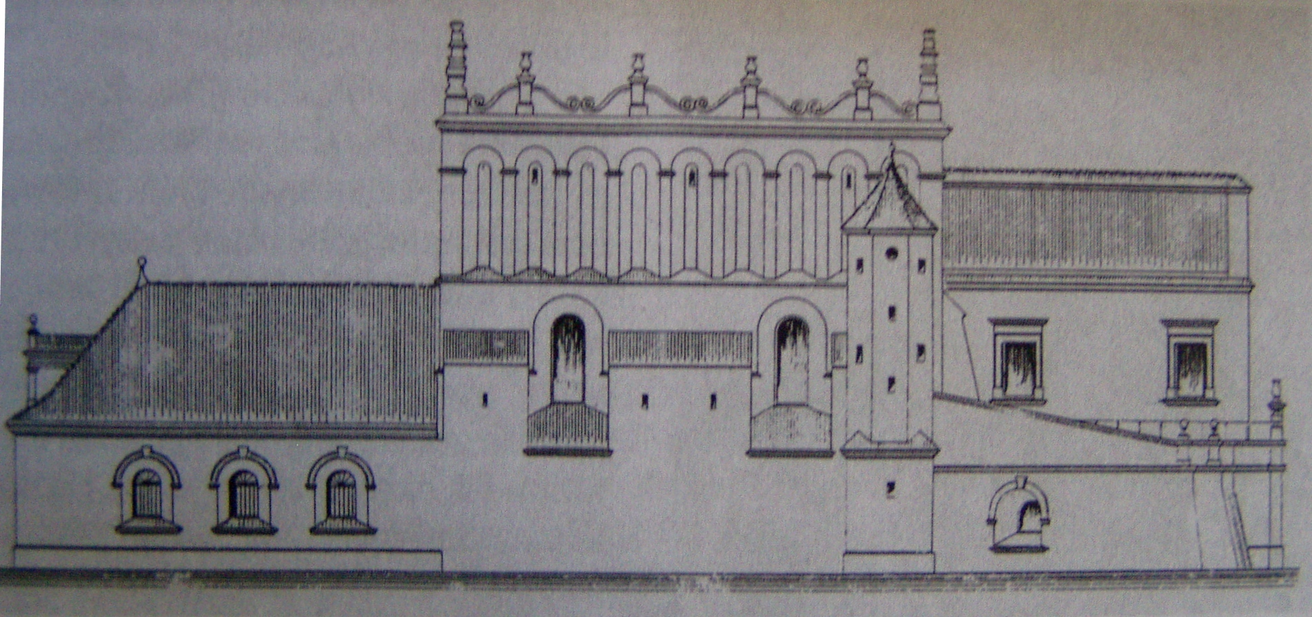 Projekt restauracji Starej Synagogi w Krakowie (1904)